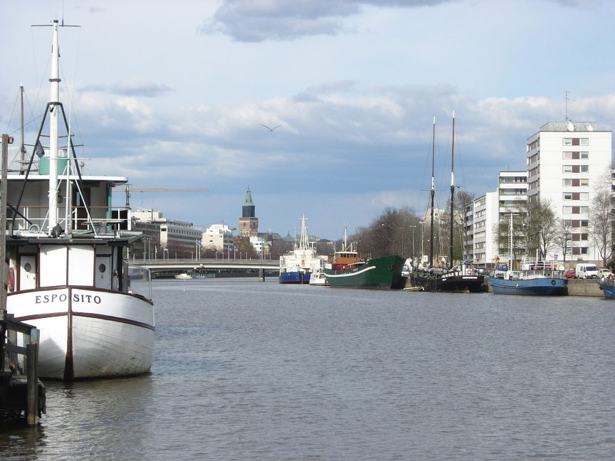 Aurajoki